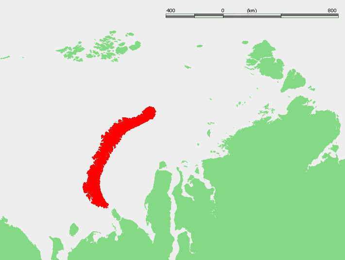 Nordensjelda Islands